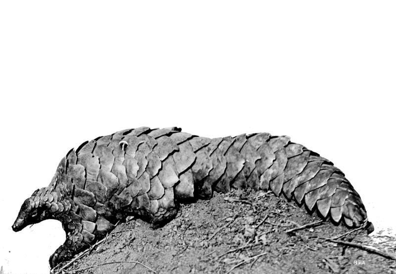 Schuppentier